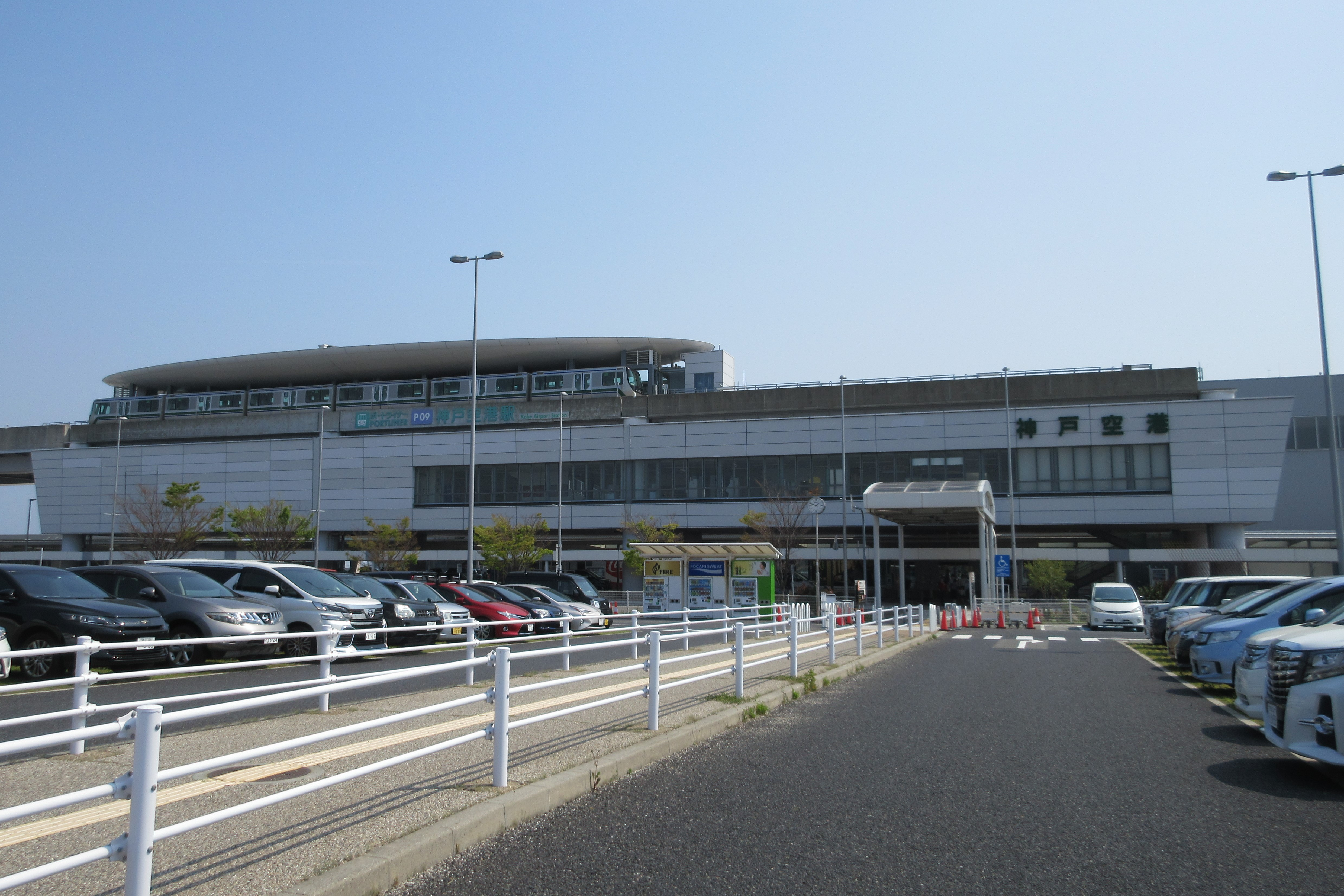 ポートライナー神戸空港駅